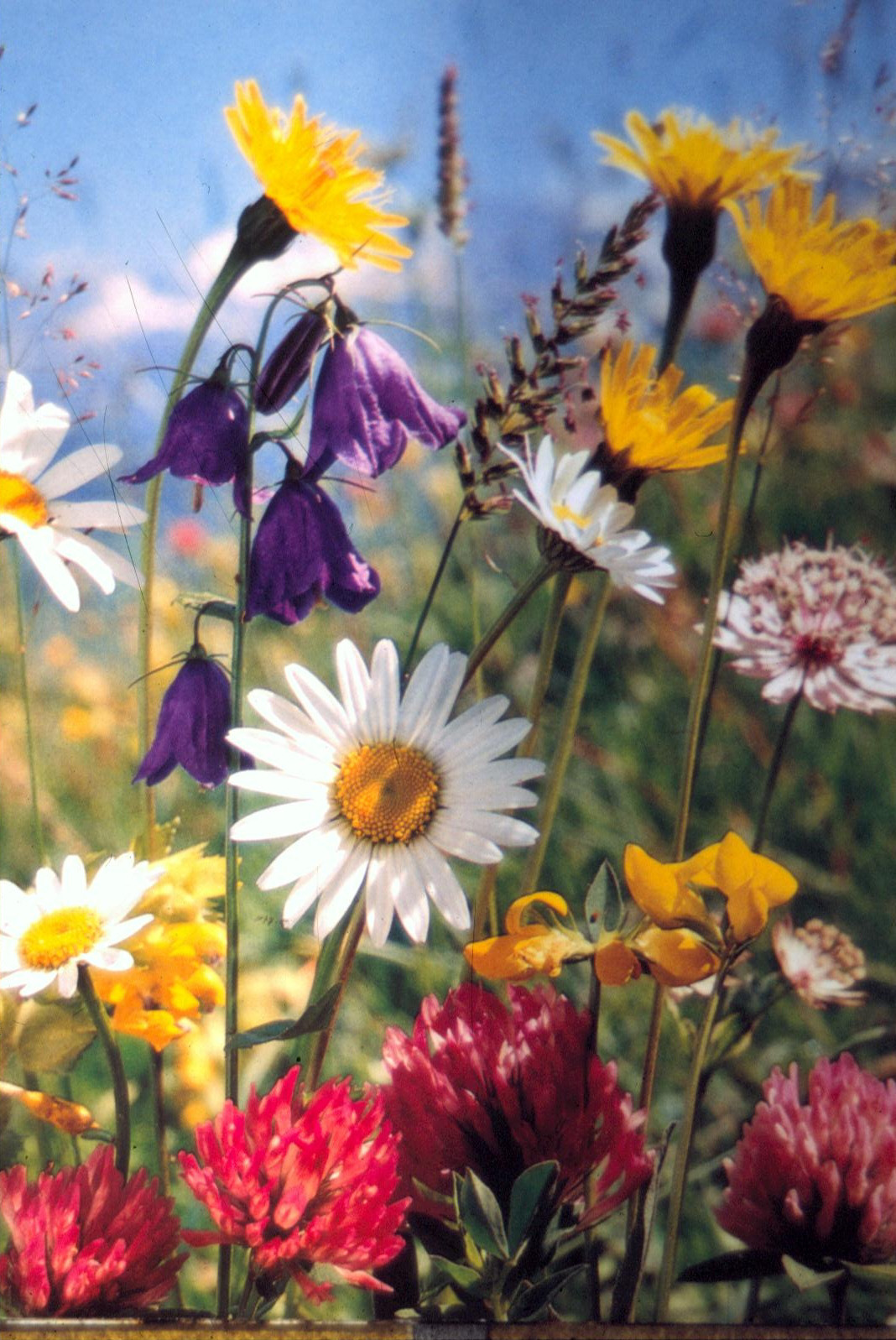 Sommerblumenstrauß, fotografiert in Gelsenkirchen 1975